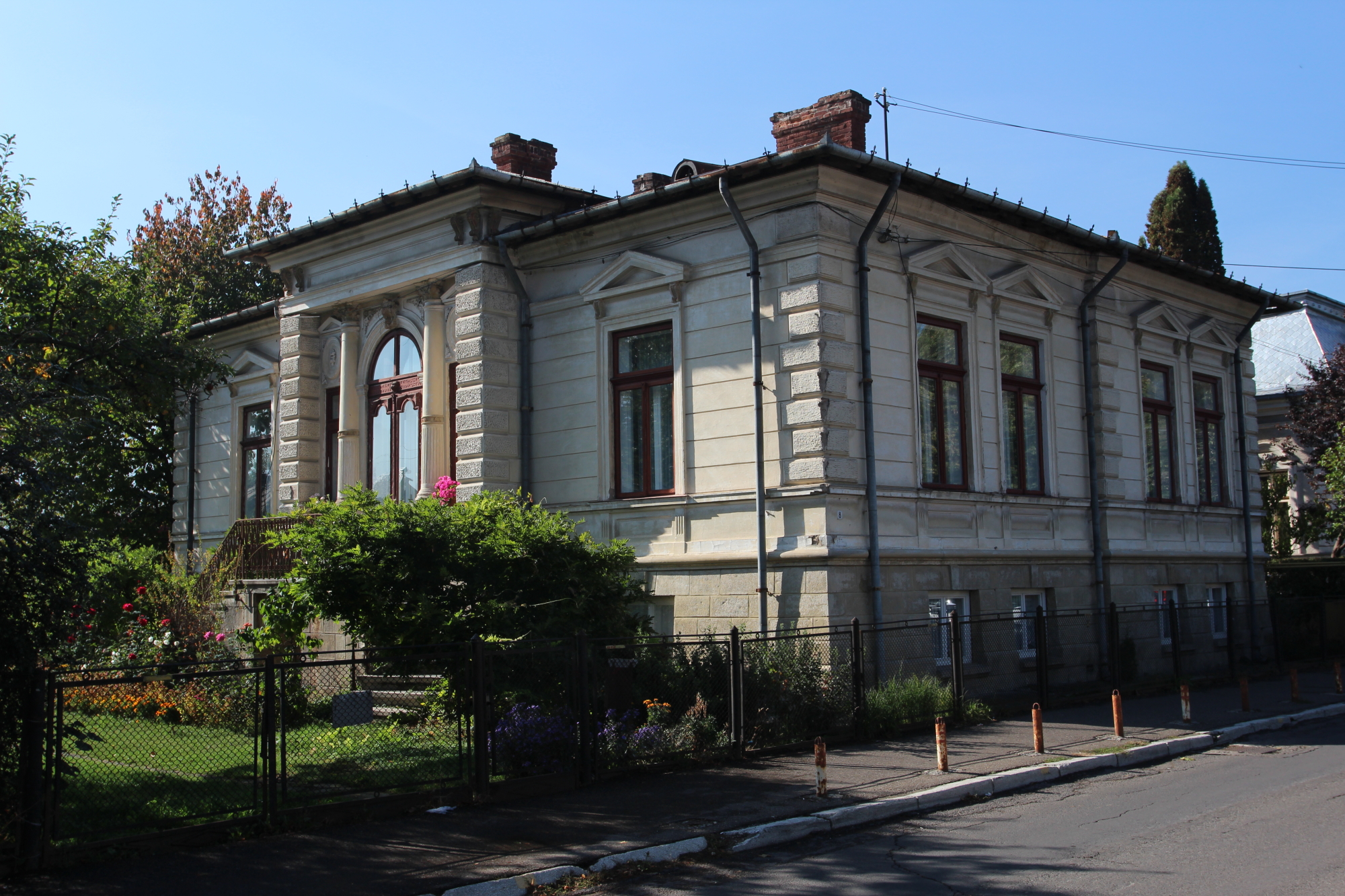 Casă str.Alexndru cel Bun